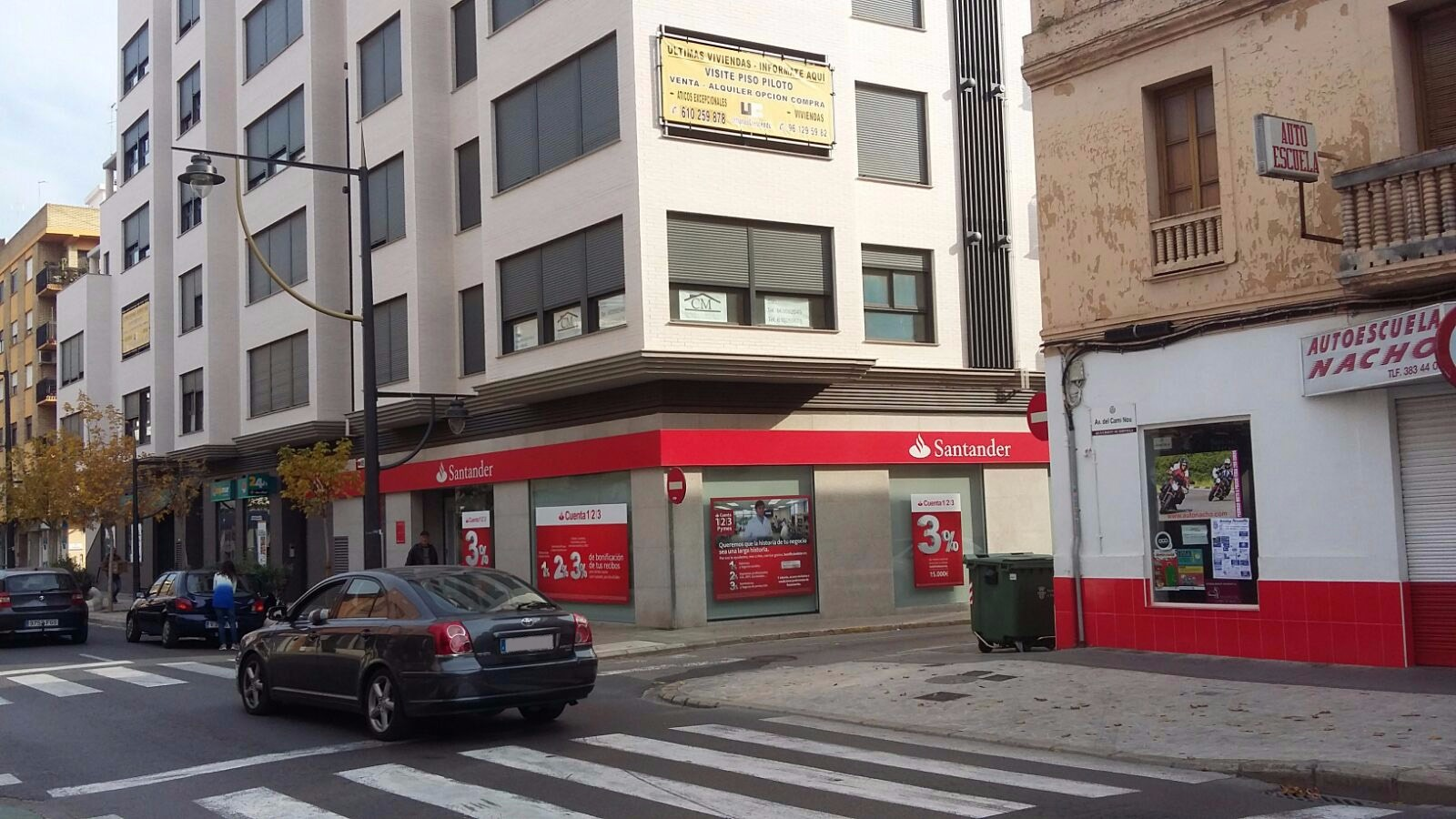 Antiga situació de la casa on va viure Vicente Lis Sena